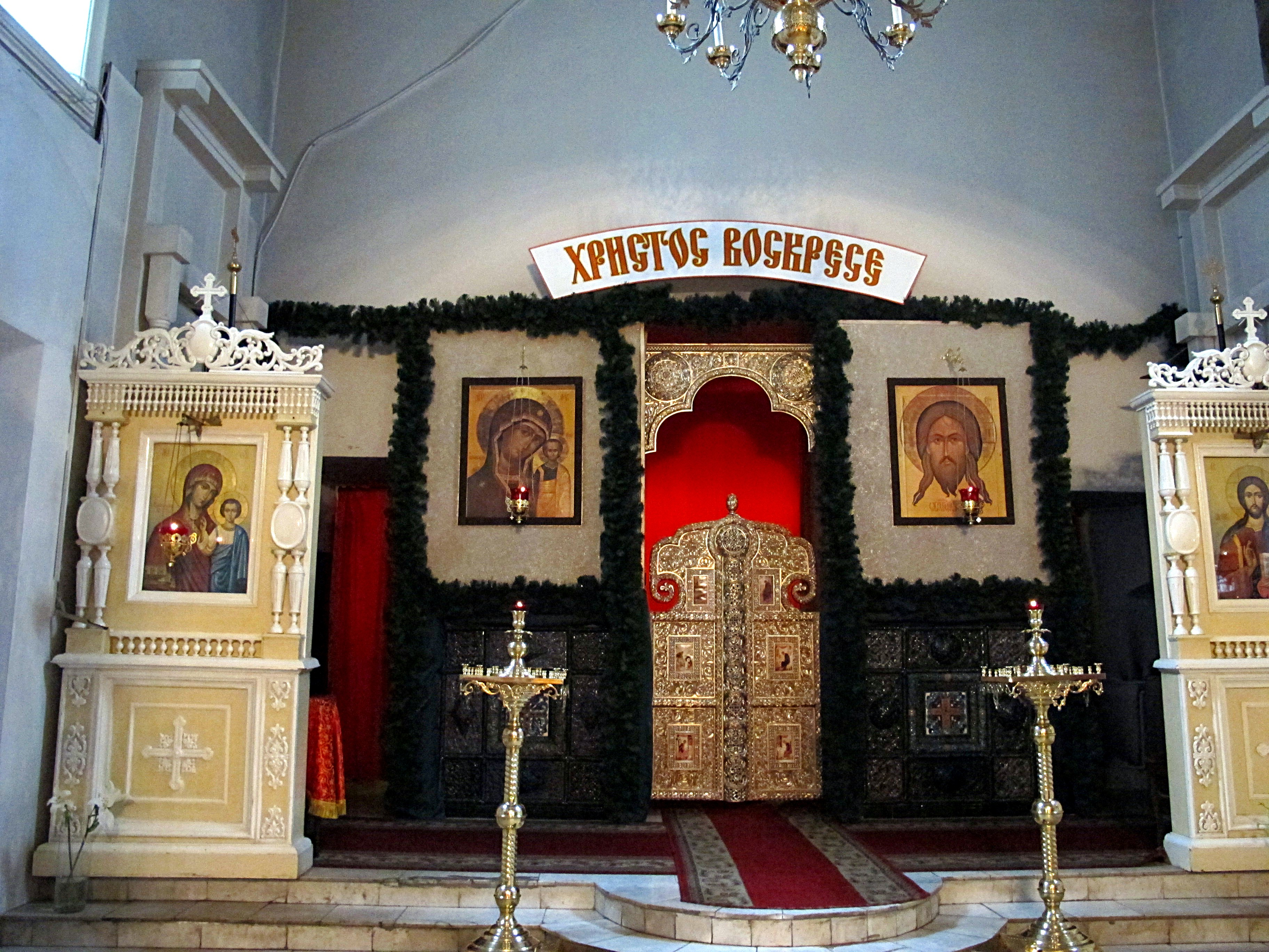 Иконостас Церкови Николая Чудотворца в Подкопаях